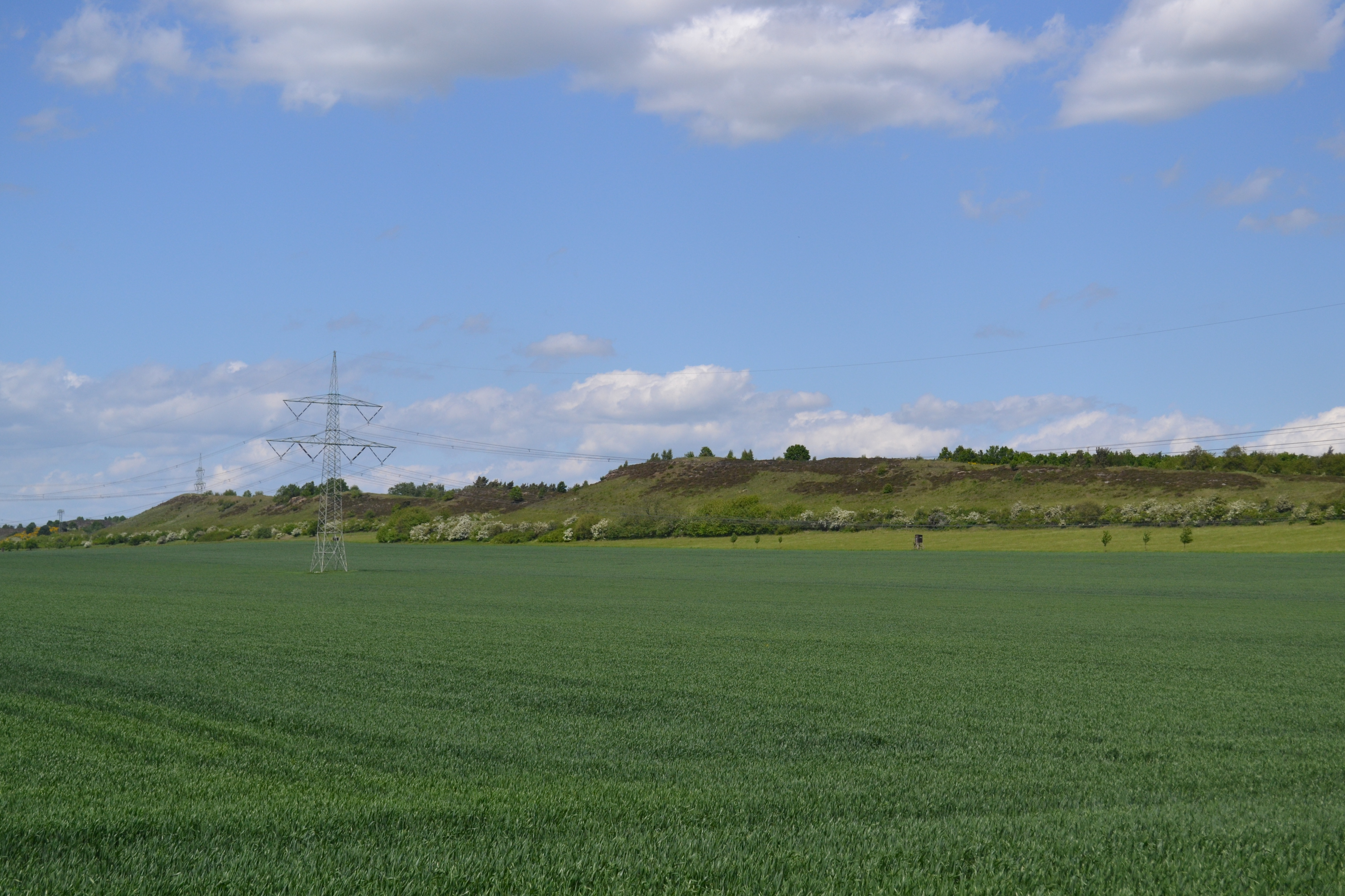 Naturschutz- und Trockenrasengebiet "Harsleber Berge" im Landkreis Harz; 380-kV-Freileitung